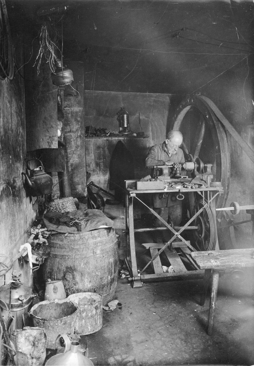 Музей: Нацыянальны гістарычны музей Рэспублікі Беларусь Тып: аўдыёвізуальныя крыніцы Від: фотадакументы Прадметнае імя: фатаграфія Аўтары: Дашкевіч Леў Урбанавіч; Матэрыялы: фотапапера жэлацінавая бромапасераброная; Тэхналогіі стварэння: фотадрук кантактны; Дата стварэння: 1920-1929 гг. Месца стварэння: БССР, Мінск Памеры: 17,4х12,4 см